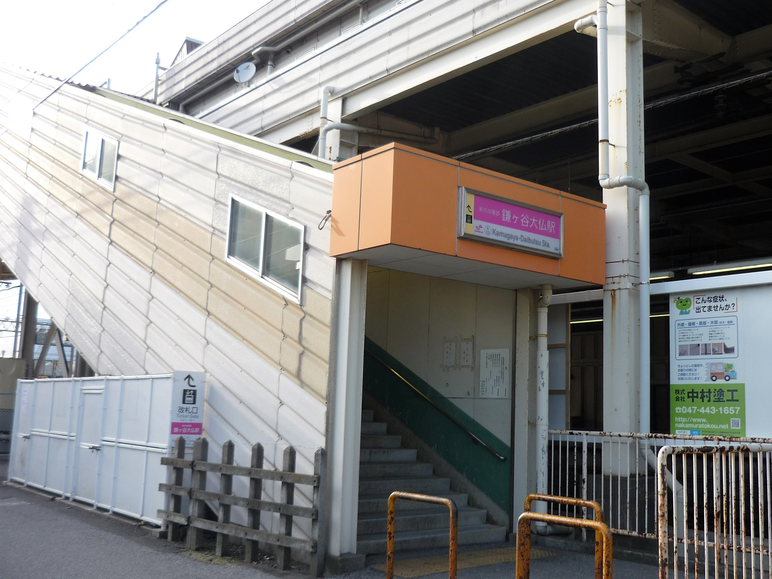 鎌ヶ谷大仏駅南口 Panasonic Lumix DMC-FS3